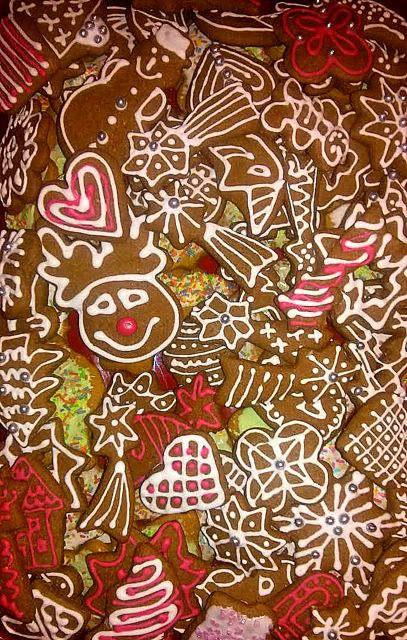 Pierniki Natalii